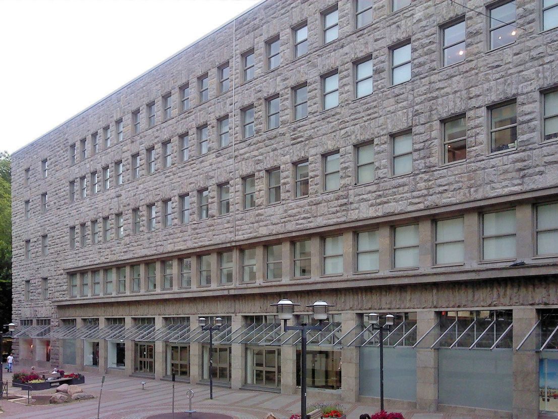 ehem. Kaufhaus Loosen, vorm. Blum, heute Peek & Cloppenburg in Essen-Mitte